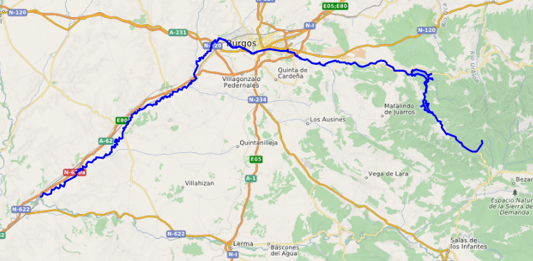 carte réalisée sur umap This map may be incomplete, and may contain errors. Don't rely solely on it for navigation.